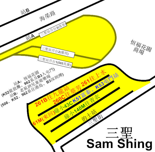 中文（香港）: 三聖巴士總站的平面圖